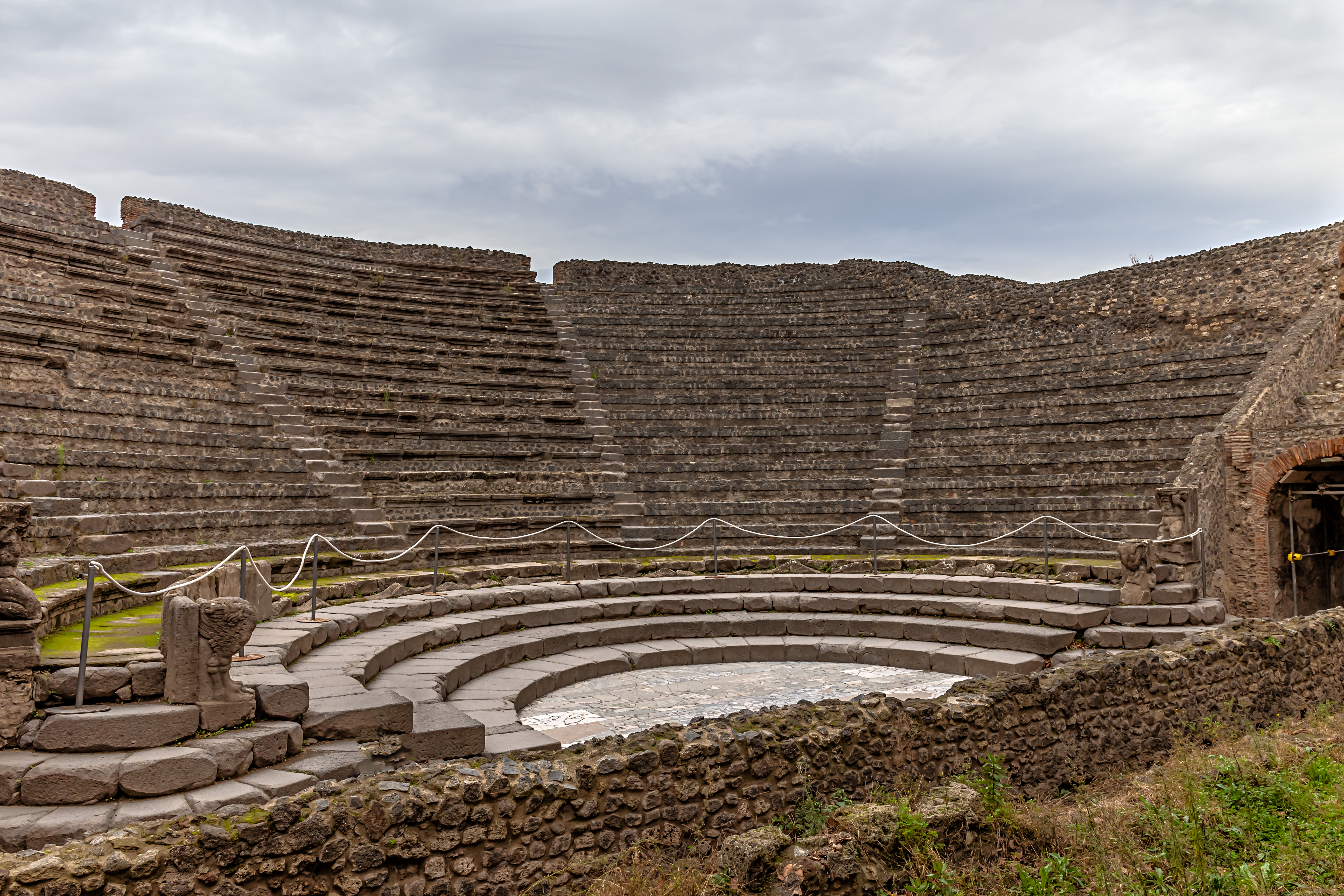 Das Odeion (kleines Theater) in Pompeji